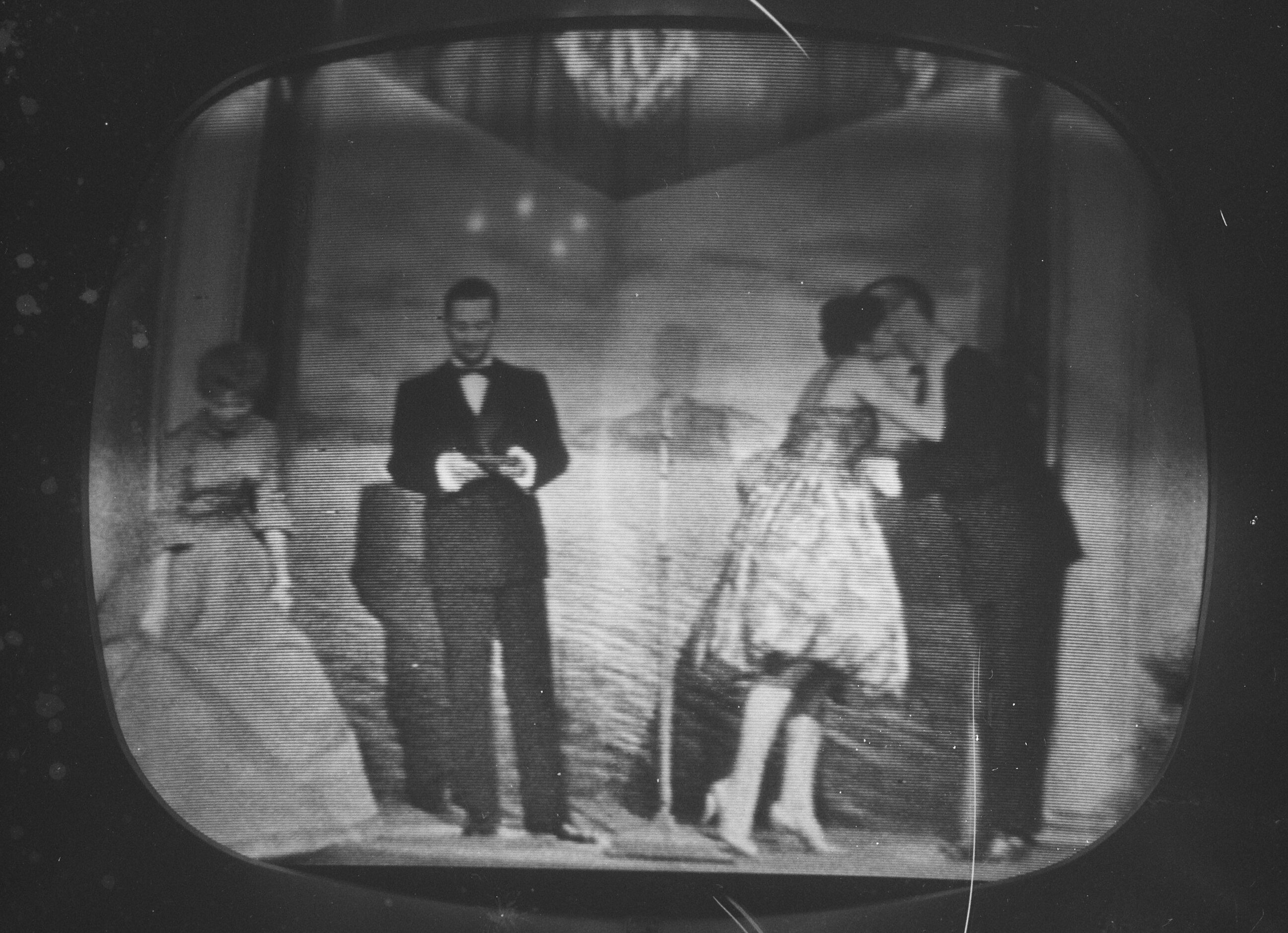 Collectie / Archief : Fotocollectie Anefo Reportage / Serie : [ onbekend ] Beschrijving : Eurovisie Songfestival 1959 te Cannes. Opname van televisie. Teddy Scholten omhelst Dolf Van der Linden. Links Jacqueline Joubert (?) Datum : 11 maart 1959 Trefwoorden : artiesten, dirigenten, muziek, songfestivals, televisies Persoonsnaam : Linden, Dolf van der, Scholten, Teddy Fotograaf : Noske, J.D. / Anefo Auteursrechthebbende : Nationaal Archief Materiaalsoort : Negatief (zwart/wit) Nummer archiefinventaris : bekijk toegang 2.24.01.03 Bestanddeelnummer : 910-2089